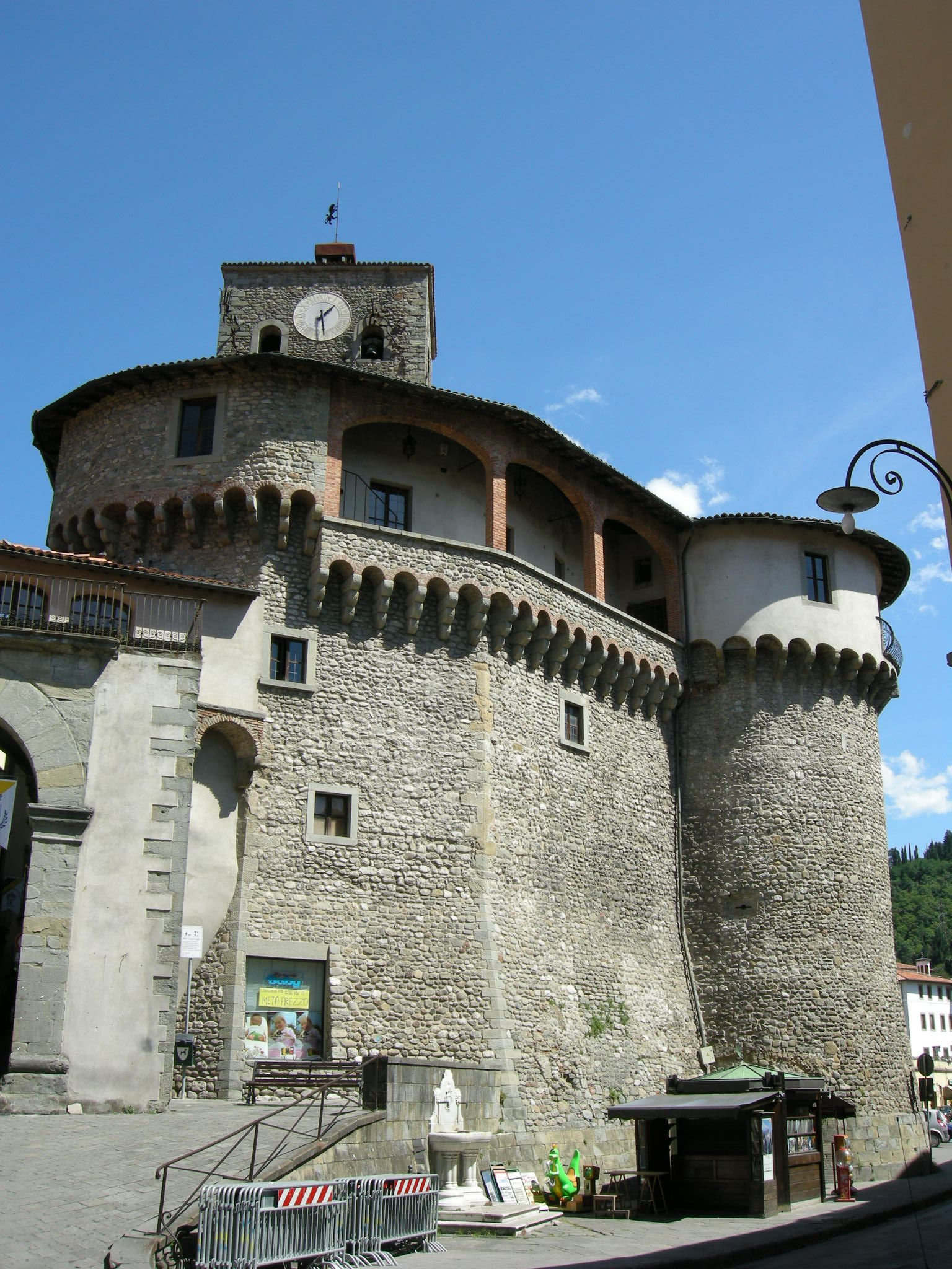 Rocca aroistesca, esterno